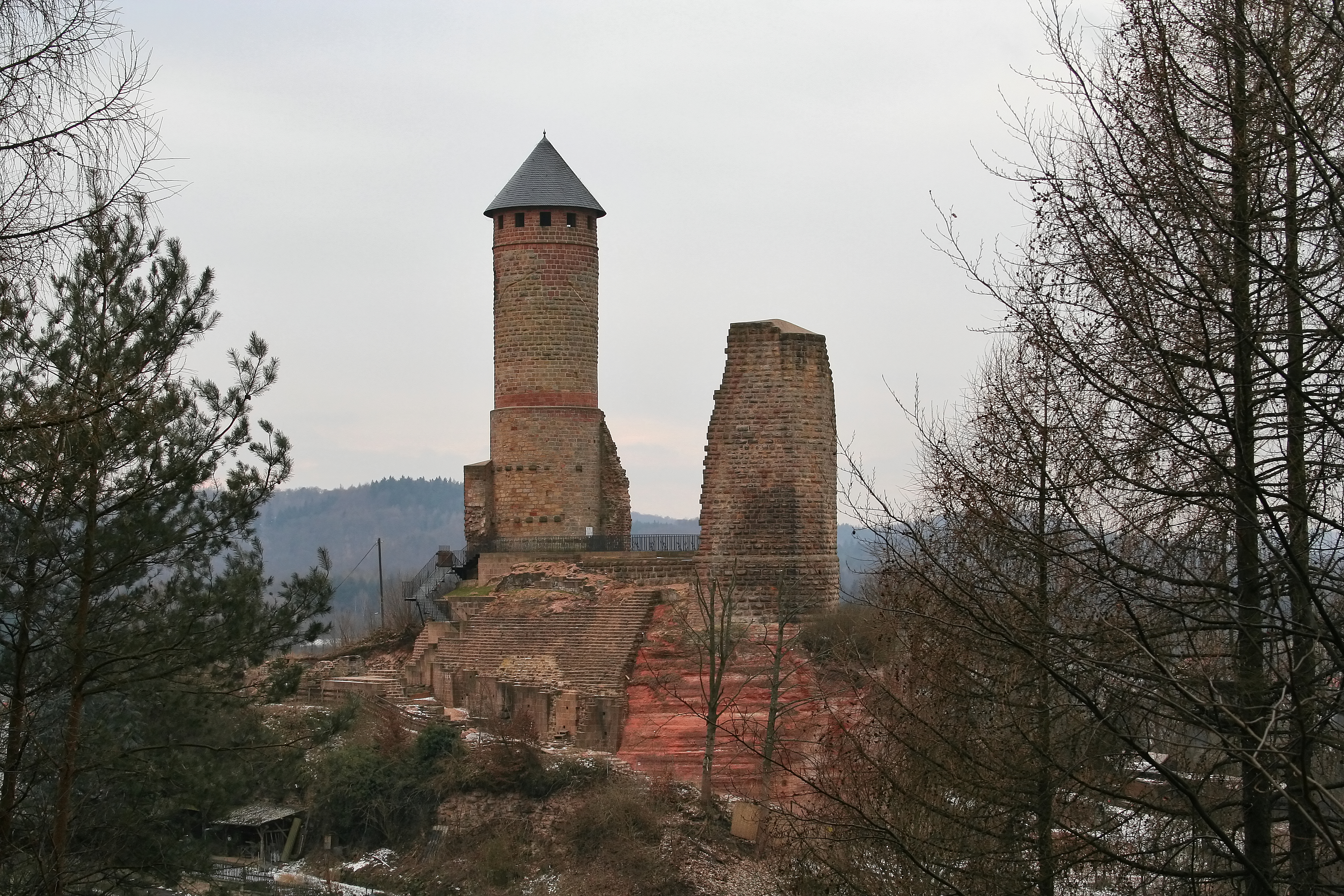 Burk Kirkel